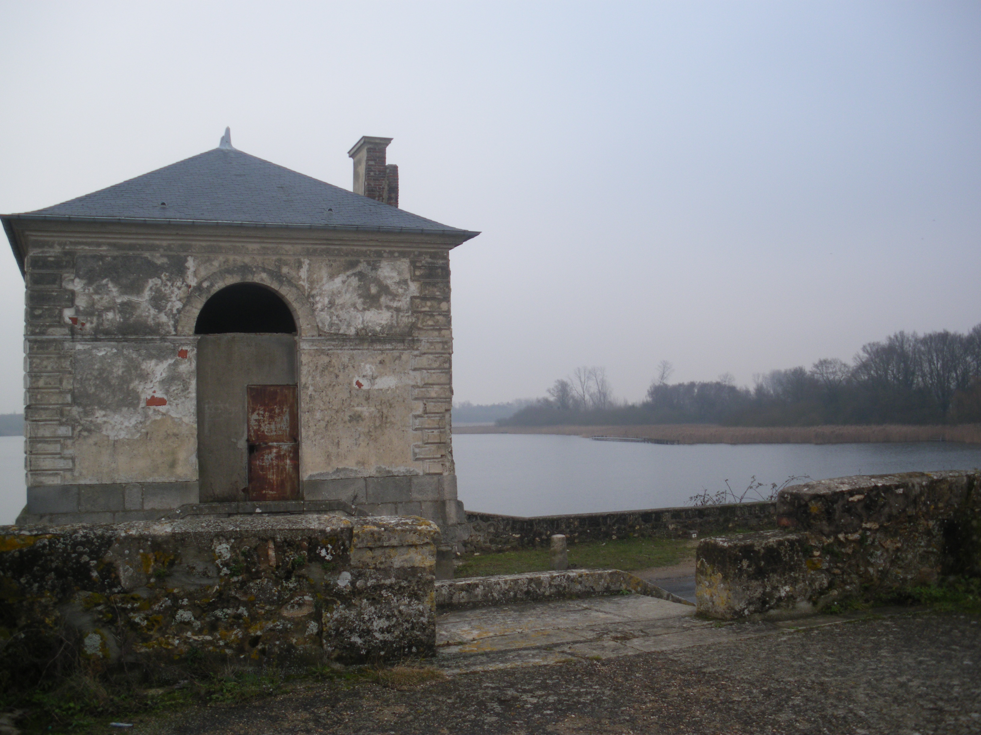 Etang de Saclay, Essonne, France